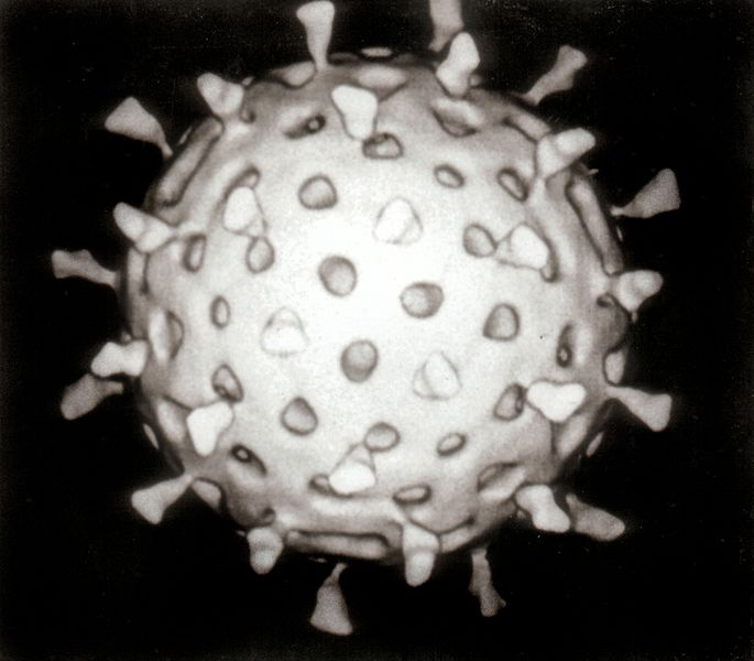 Rotavirus